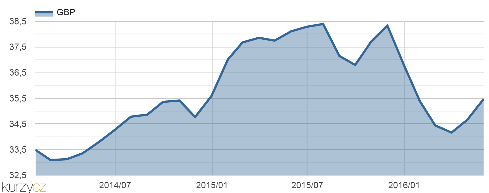 GBP - Devizové kurzy ke konci měsíce